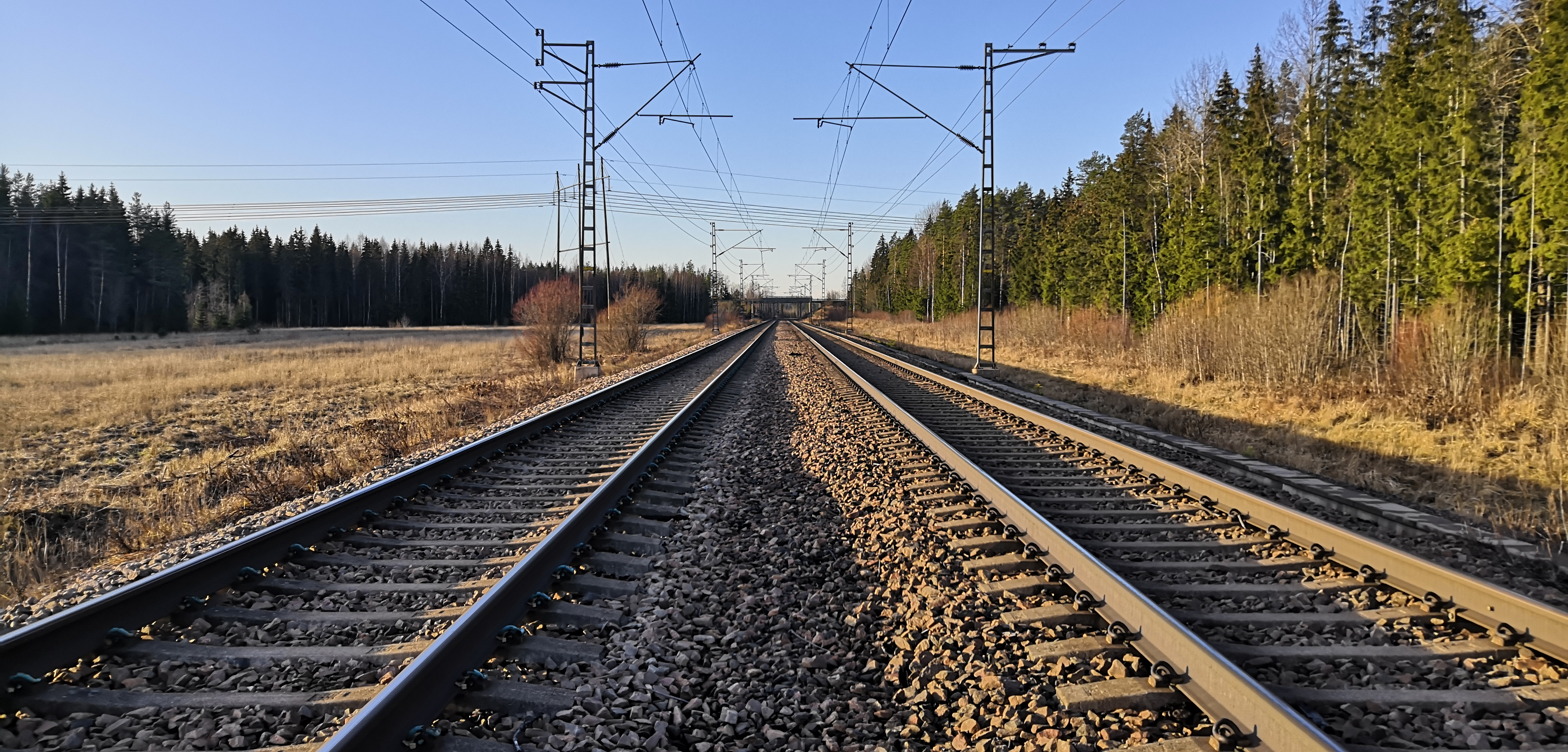 Lahden ja Kouvolan välinen rautatie Korialla 2019